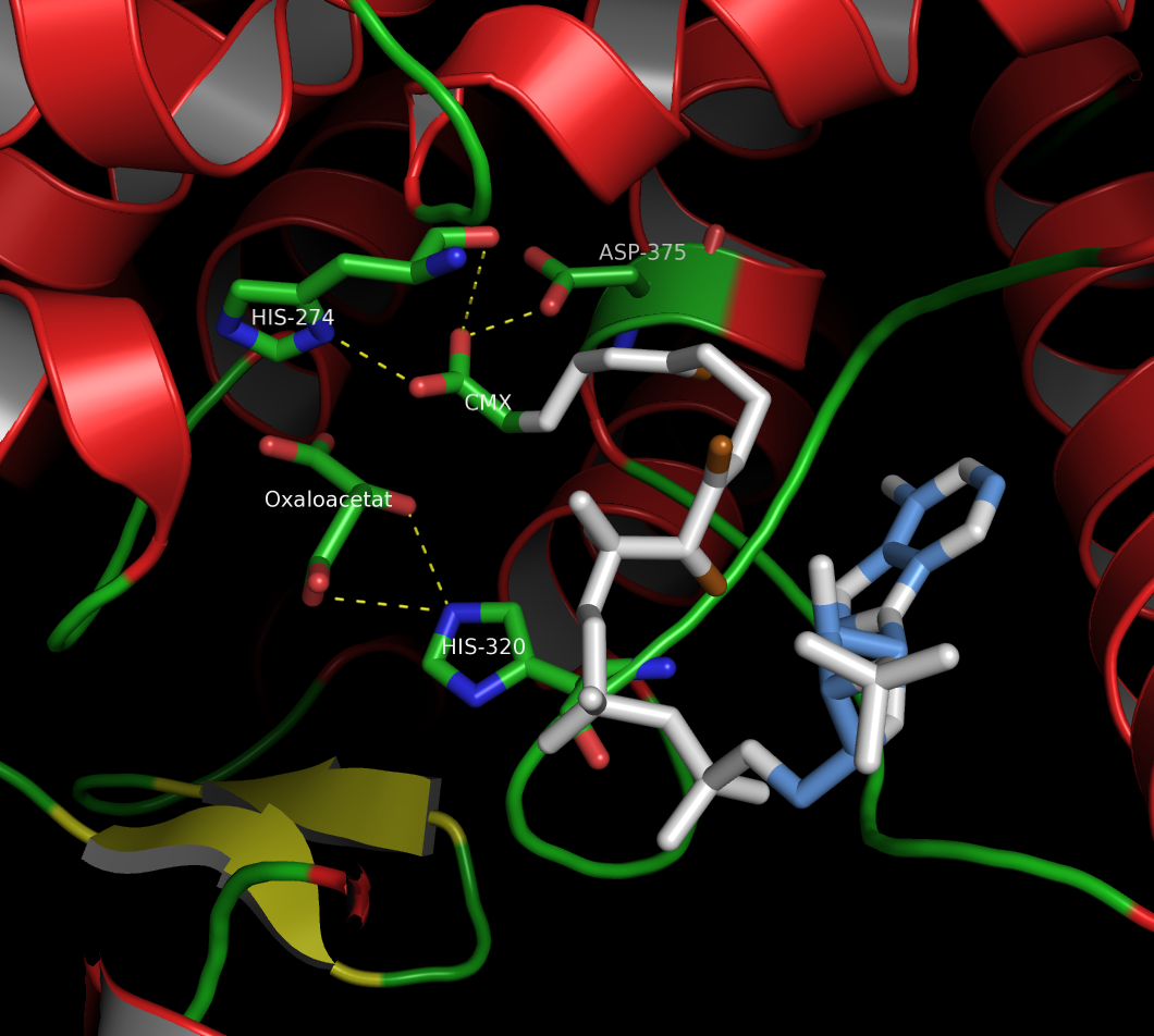 Katalytisches Zentrum der Citratsynthase des Huhns. Abbildung erstellt aus pdb 1CSI ( mit pymol 0.99 ; Enzym hat anstelle Acetyl-CoA dessen Analogon und Inhibitor CMX gebunden.